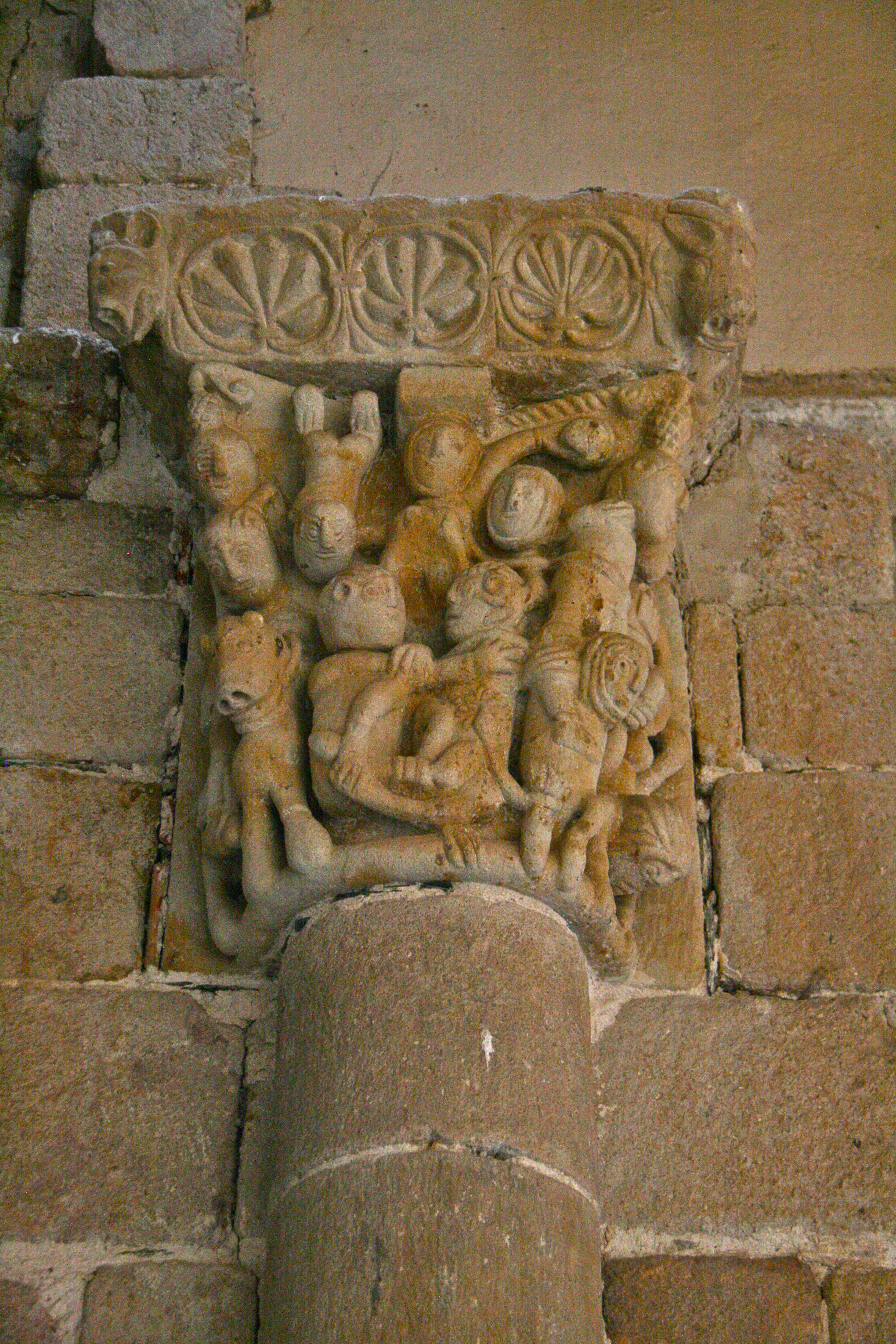 Capitel